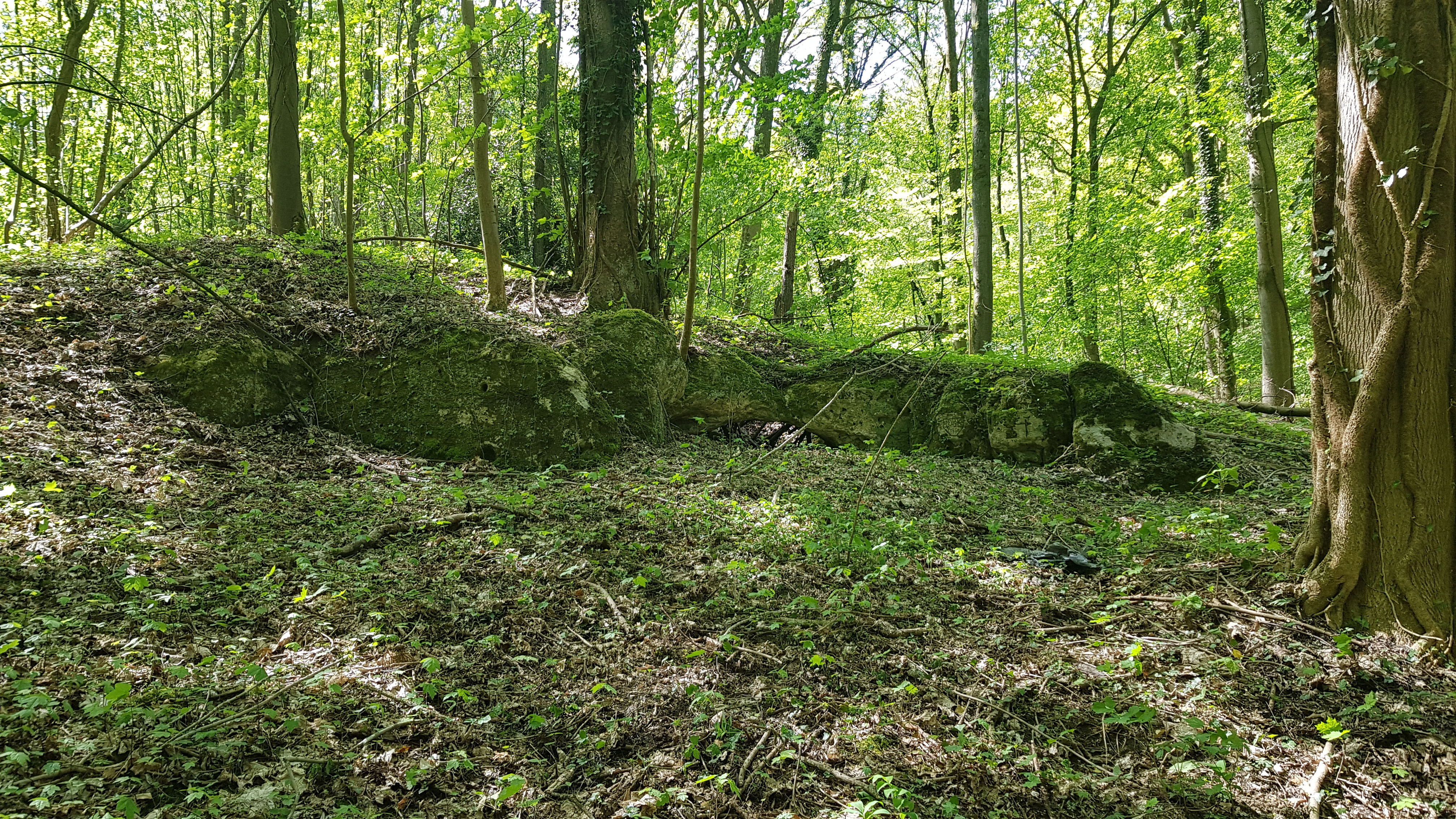 Groeve boven Kloostergroeve, Geulhem, Nederland